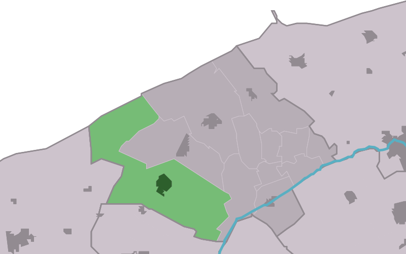 Kaartsje fan himrik fan Hallum